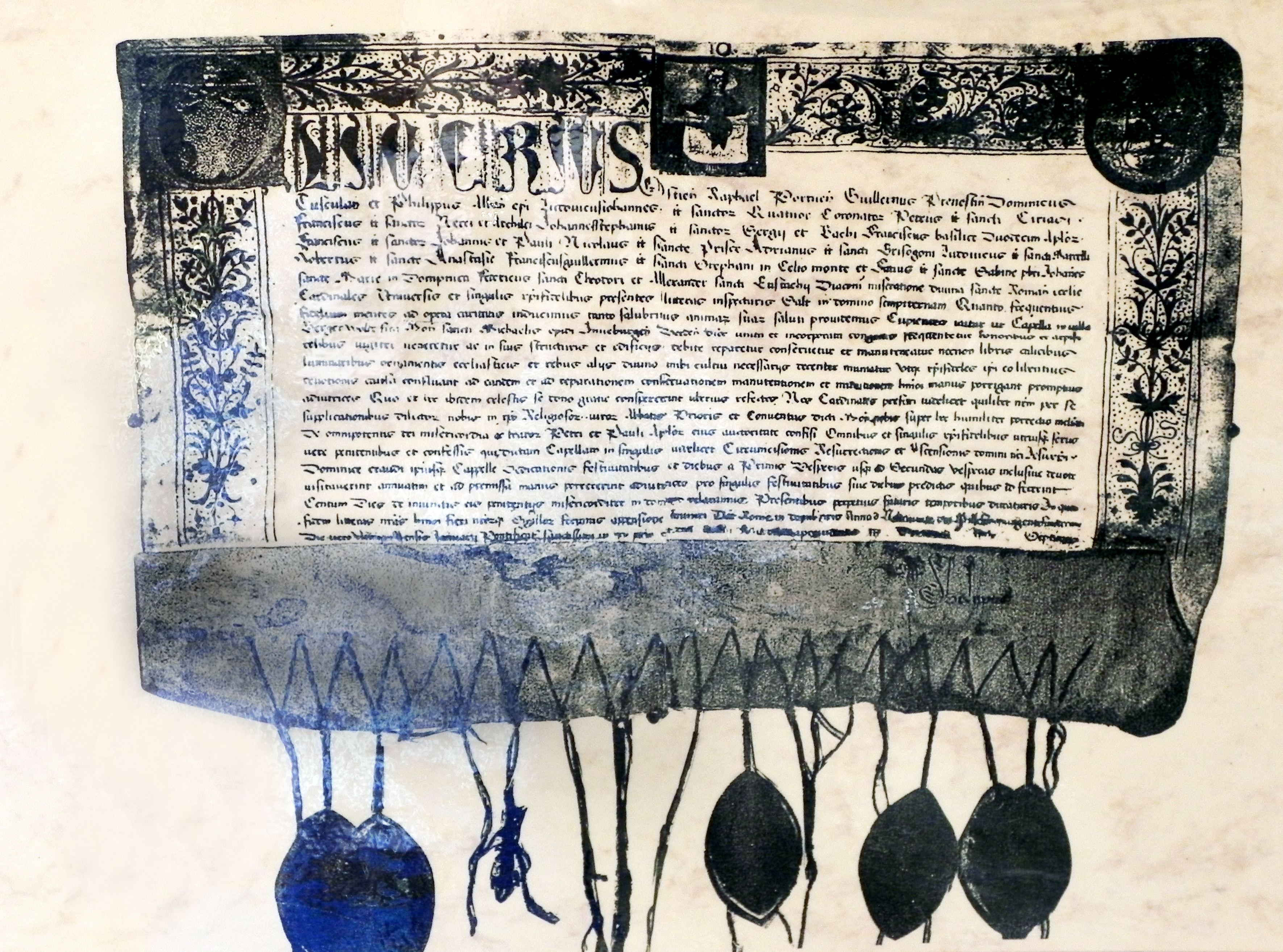 Ablassbrief des Papstes Julius II vom 31. Januar 1510 für die Kapelle in Wohlde (Bergen). Nds. Staatsarchiv Celle Orig. Des. 100 Michaeliskloster Lüneburg